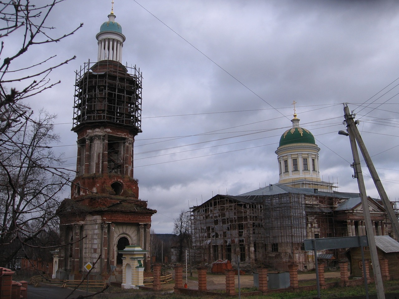 Колокольня Троицкого собора (Москва и Московская область, Яхрома, город Яхрома, Конярова улица, 6)